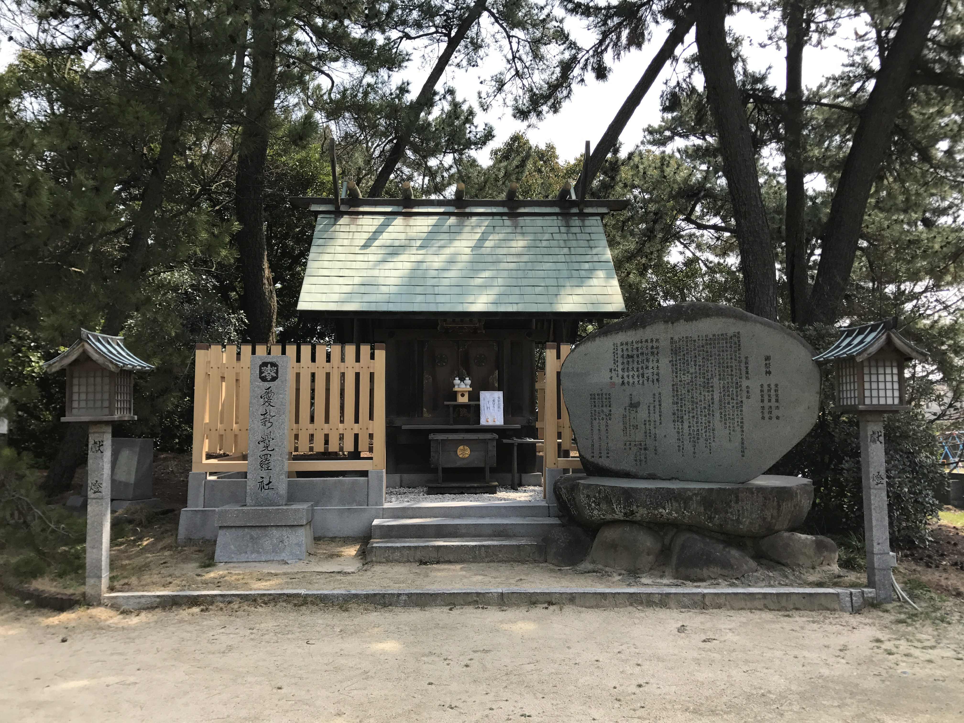 中山神社境内の愛新覚羅社